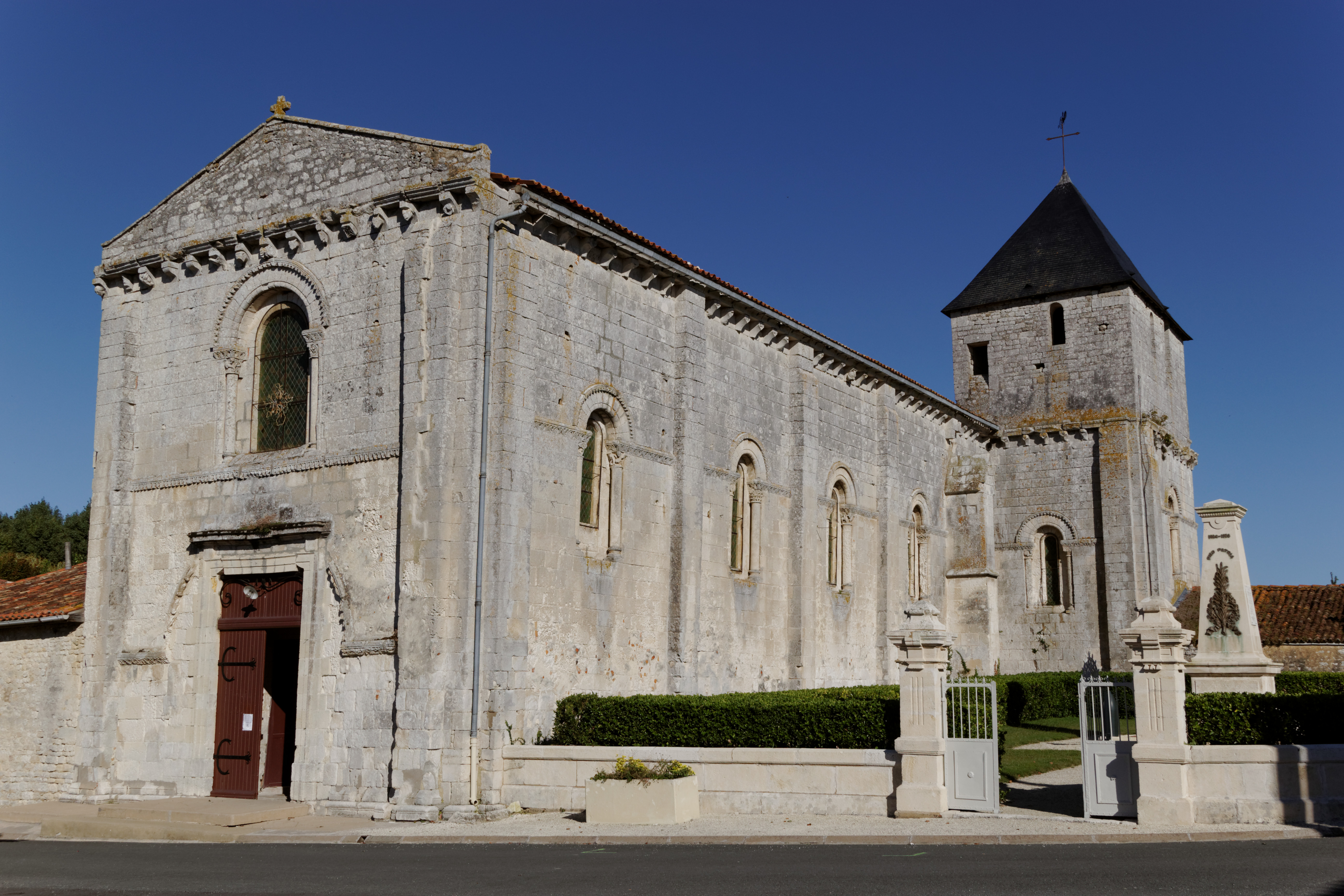 Église Saint-Vincent de Fontenet (Inscrit) .